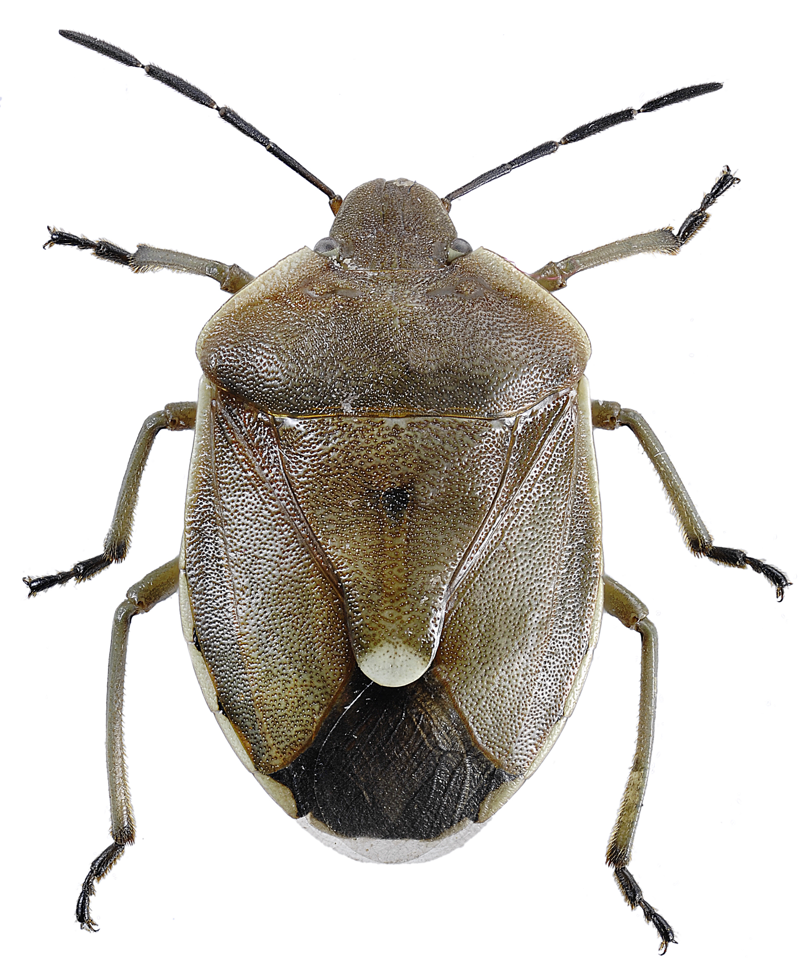 Chlorochroa pinicola